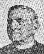 Jan Selichar (1858 - 1941), Český římskokatolický kněz.